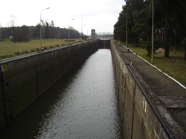 sluza Wały